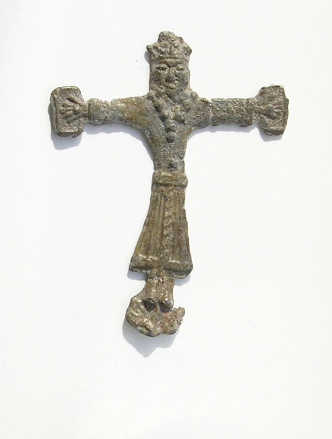 Bekleideter Christus am Kreuz. Pilgerzeichen, mittelalterlich. Focke-Museum Bremen, Germany